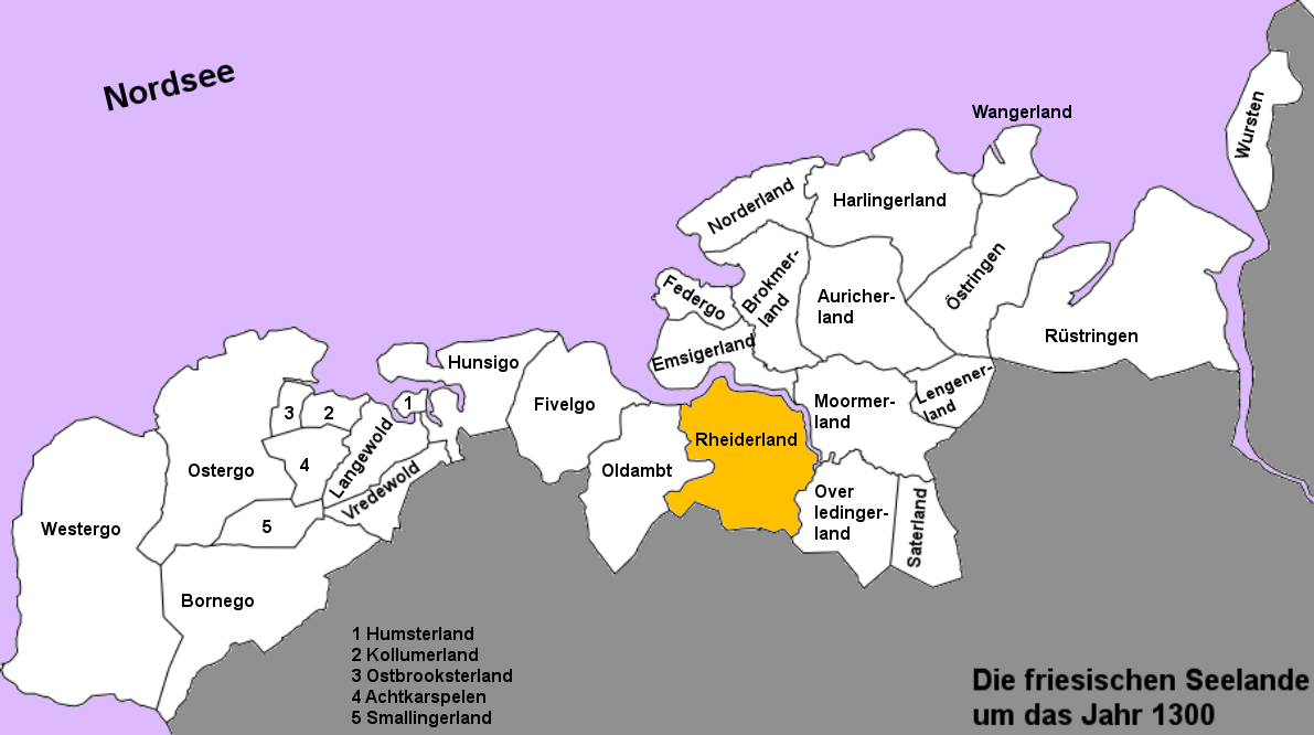 Karte der freien friesischen Seelande (Landesgemeinden) von der Zuiderzee bis zur Weser in den Grenzen um das Jahr 1300. Rheiderland hervorgehoben. (Karte ohne Inseln.)